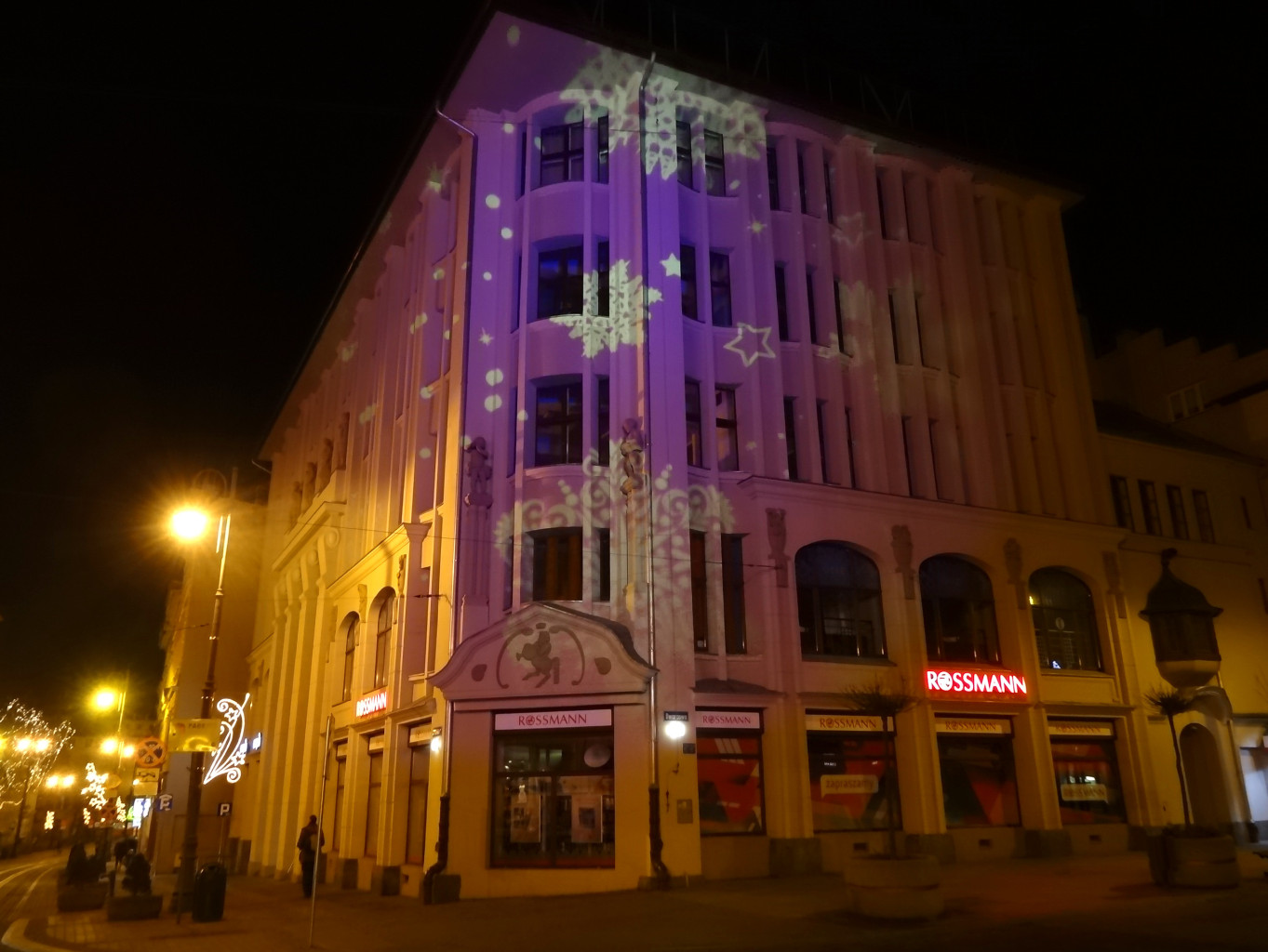 Dom Towarowy Jedynak, ul. Gdańska 15 w Bydgoszczy (zbud. 1910) podczas Świąt Bożego Narodzenia 2013